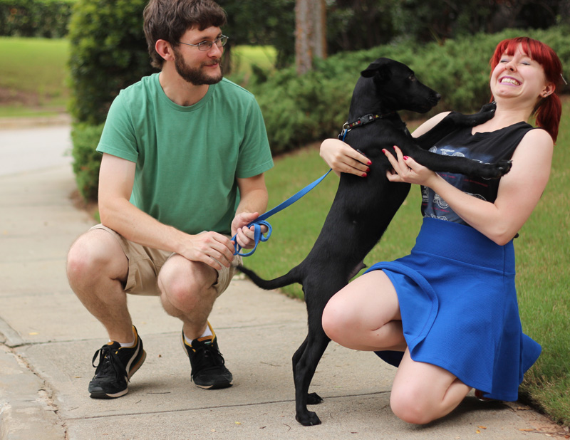 Petite Panoply: Riker jumping up Model